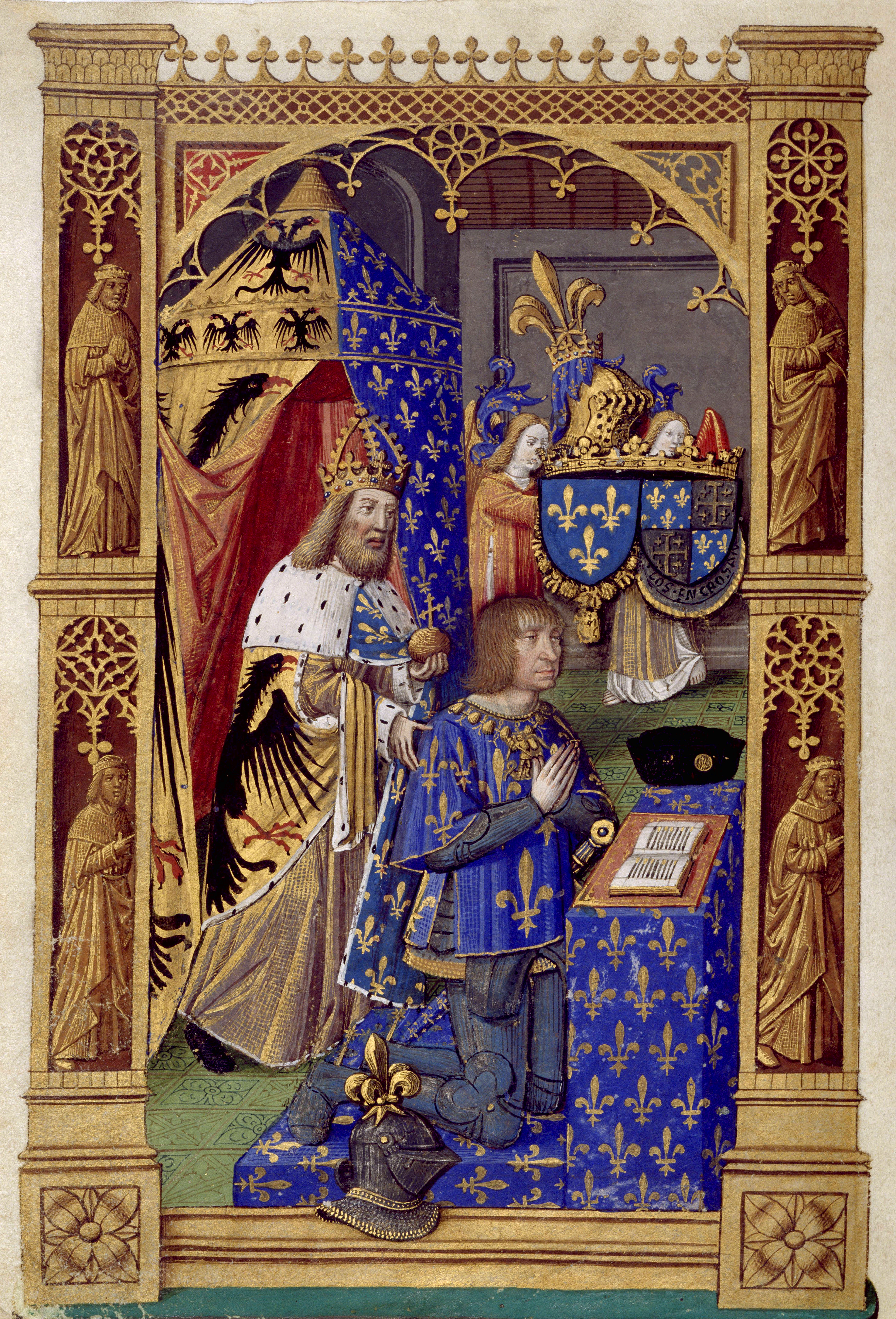 Miniatura del Libro de horas de Carlos VIII de Francia, manuscrito iluminado en pergamino, siglo XV, f.º 13v. Representa a Luis XII orante, tras él, de pie, Carlomagno; la figura de Luis XII se pintó cambiando el rostro original de Carlos VIII por el de Luis XII